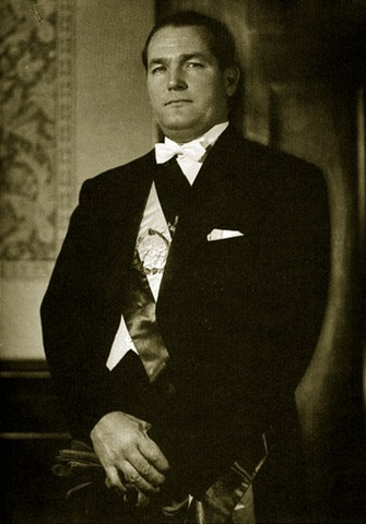 Arévalo